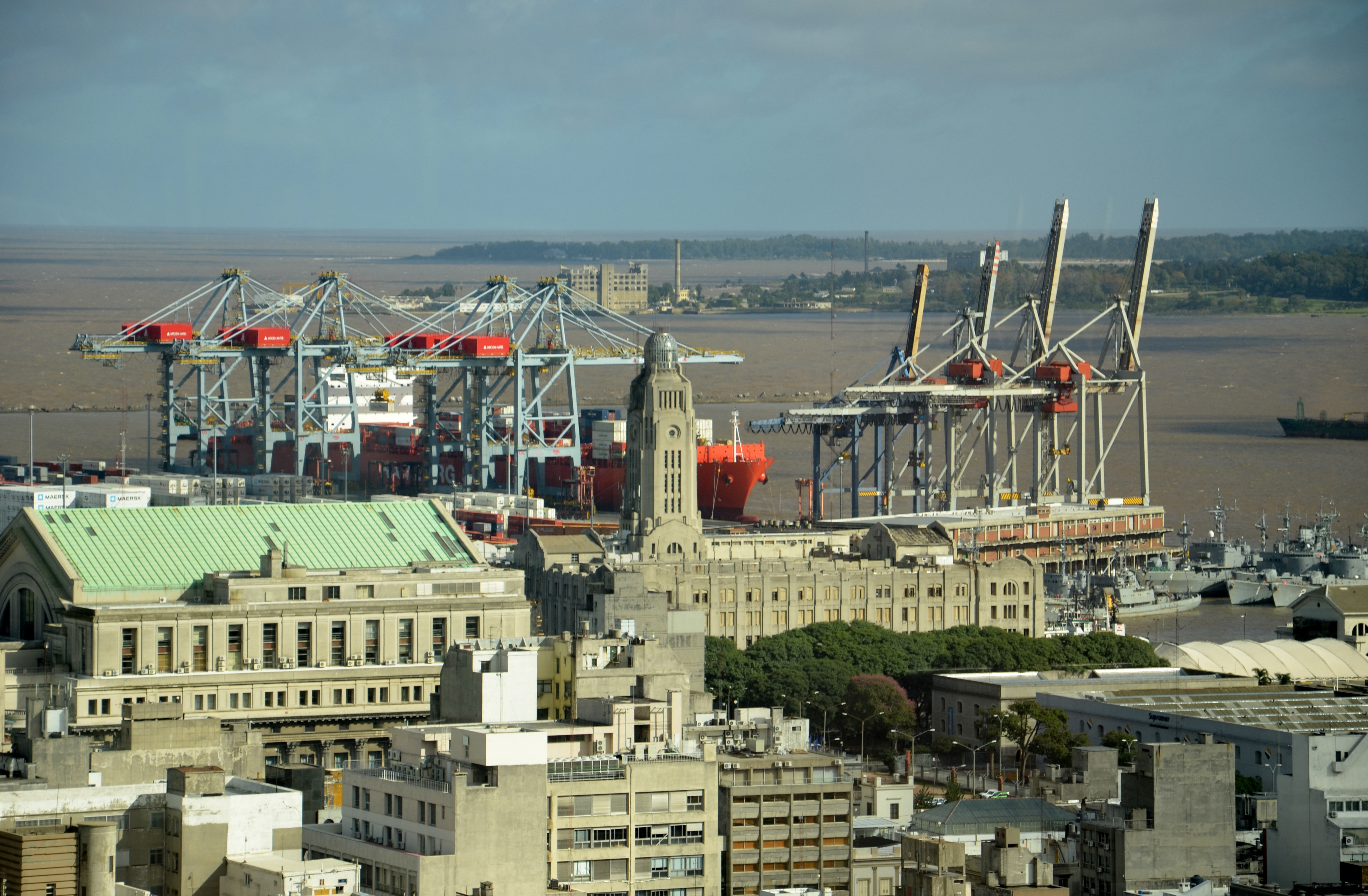 Puerto de Montevideo